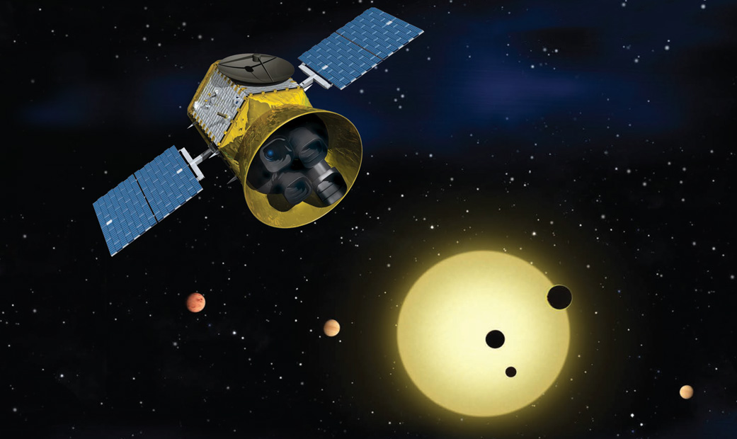 TESS 망원경 상상도